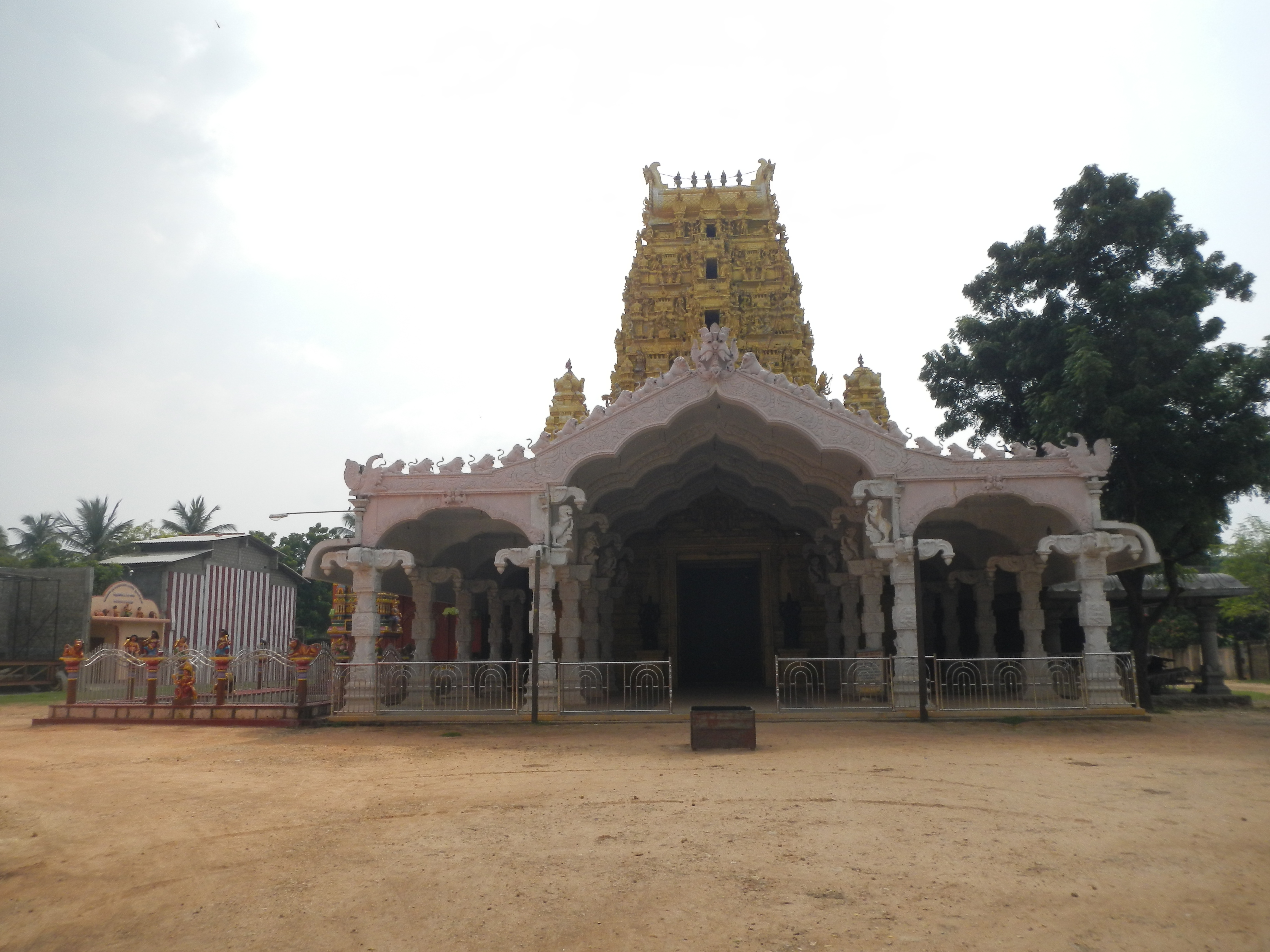 தோற்றம்.